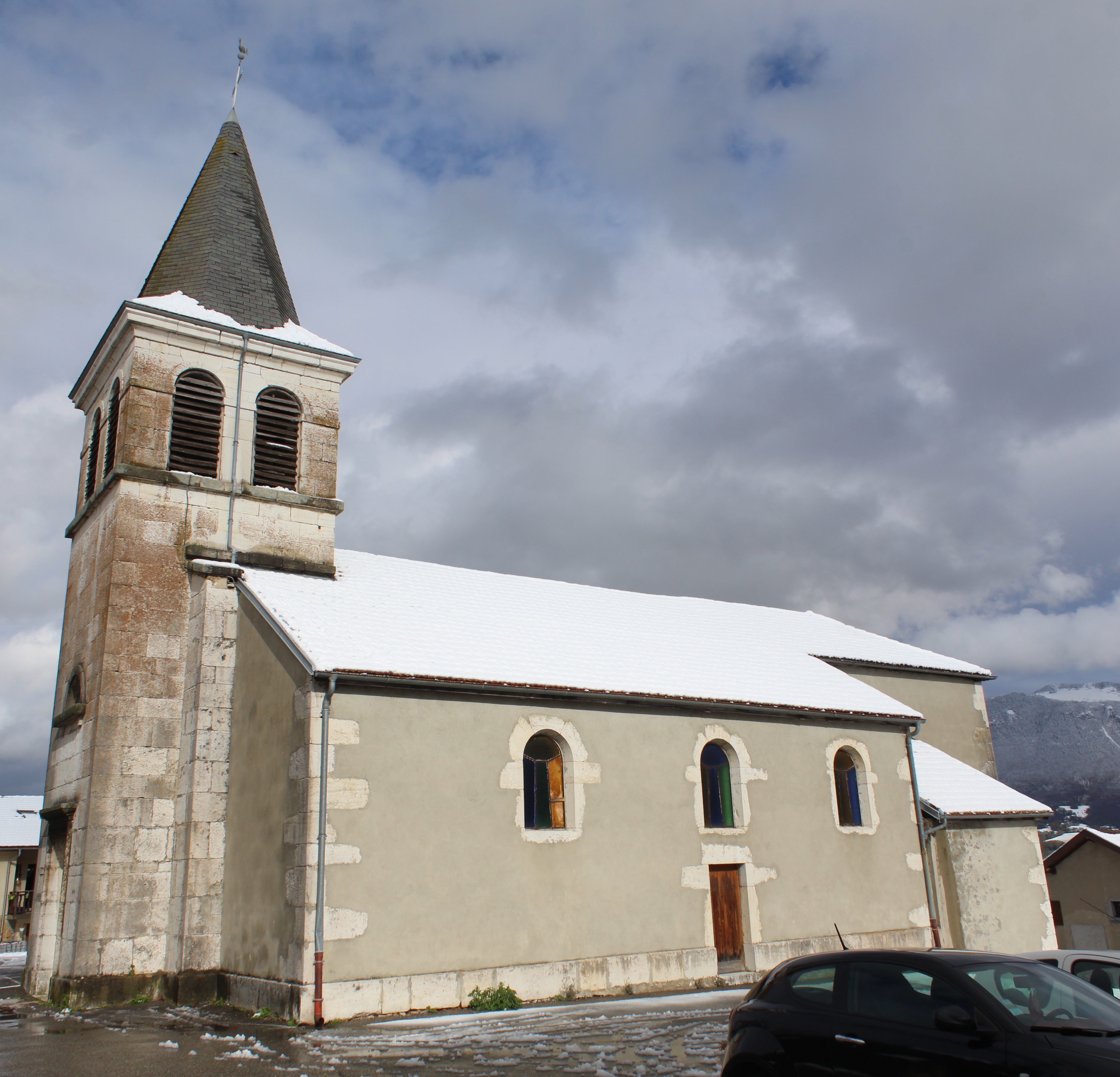 Église Saint-Paul de Vouvray, Châtillon-en-Michaille, Valserhône.